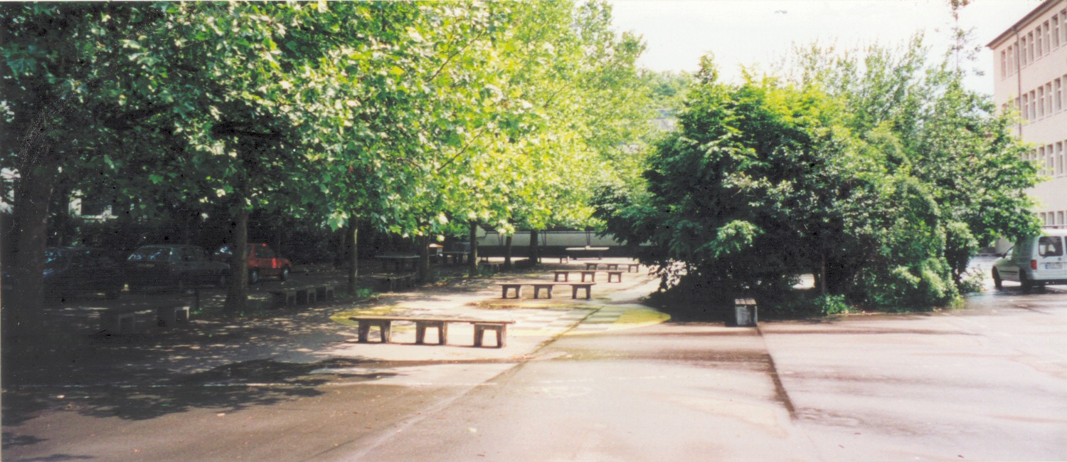 Beschreibung: Schulhof des Ludwigsgymnasiums Saarbrücken Photographer: kh80 Date: 1999-06-21 License: GFDL and cc-by-sa/2.0/de